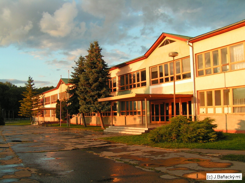 Základná škola Gorkého